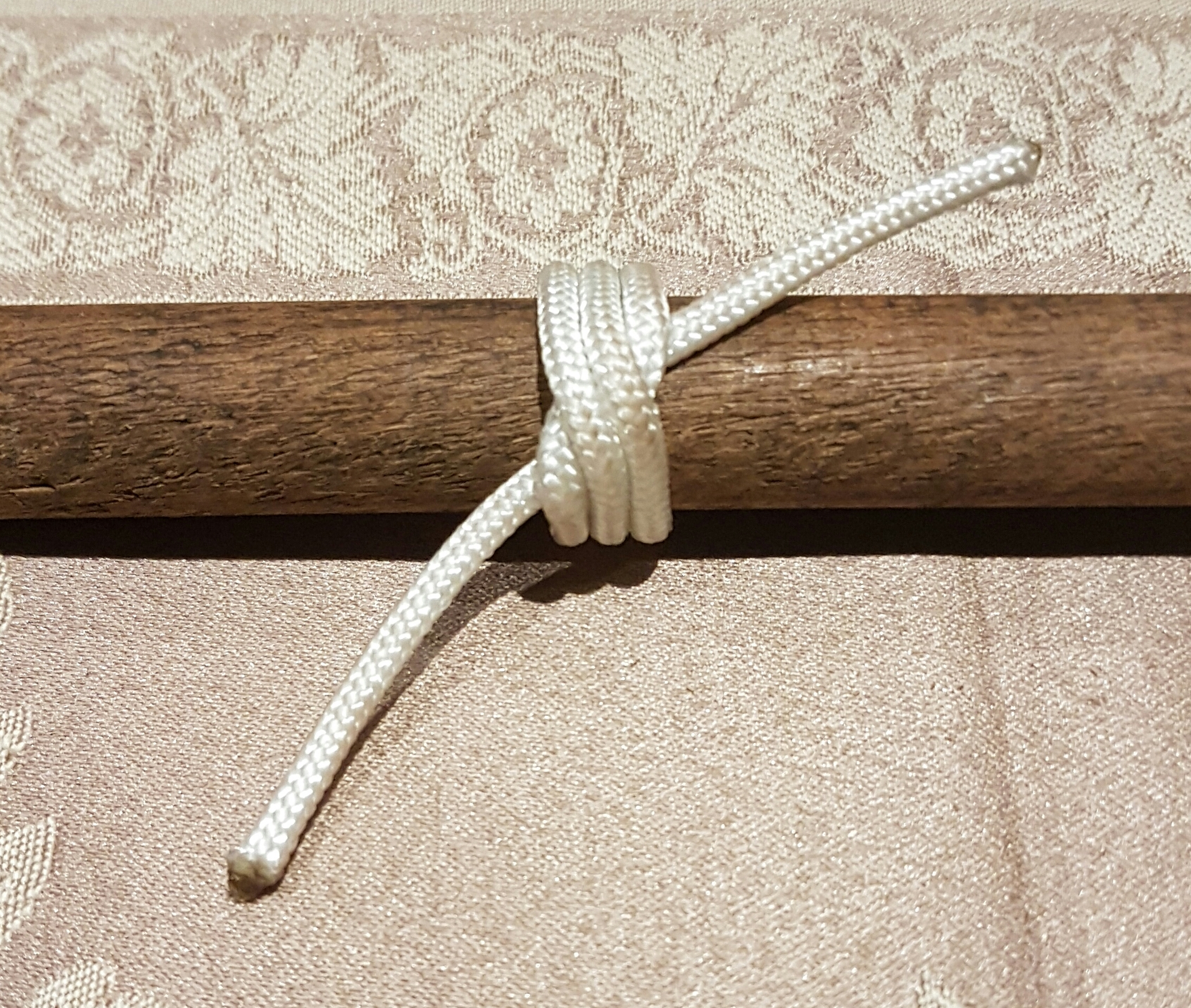 Dubbele Wurgknoop